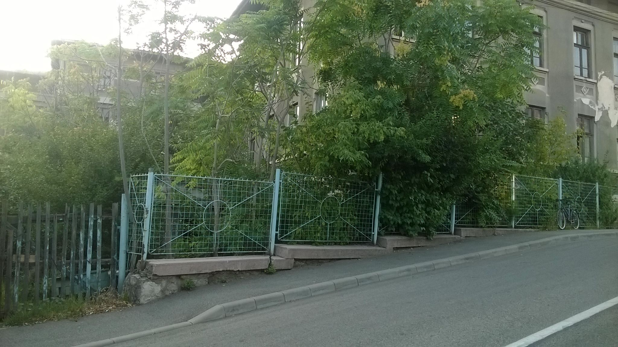 Spitalul Grecescu 02